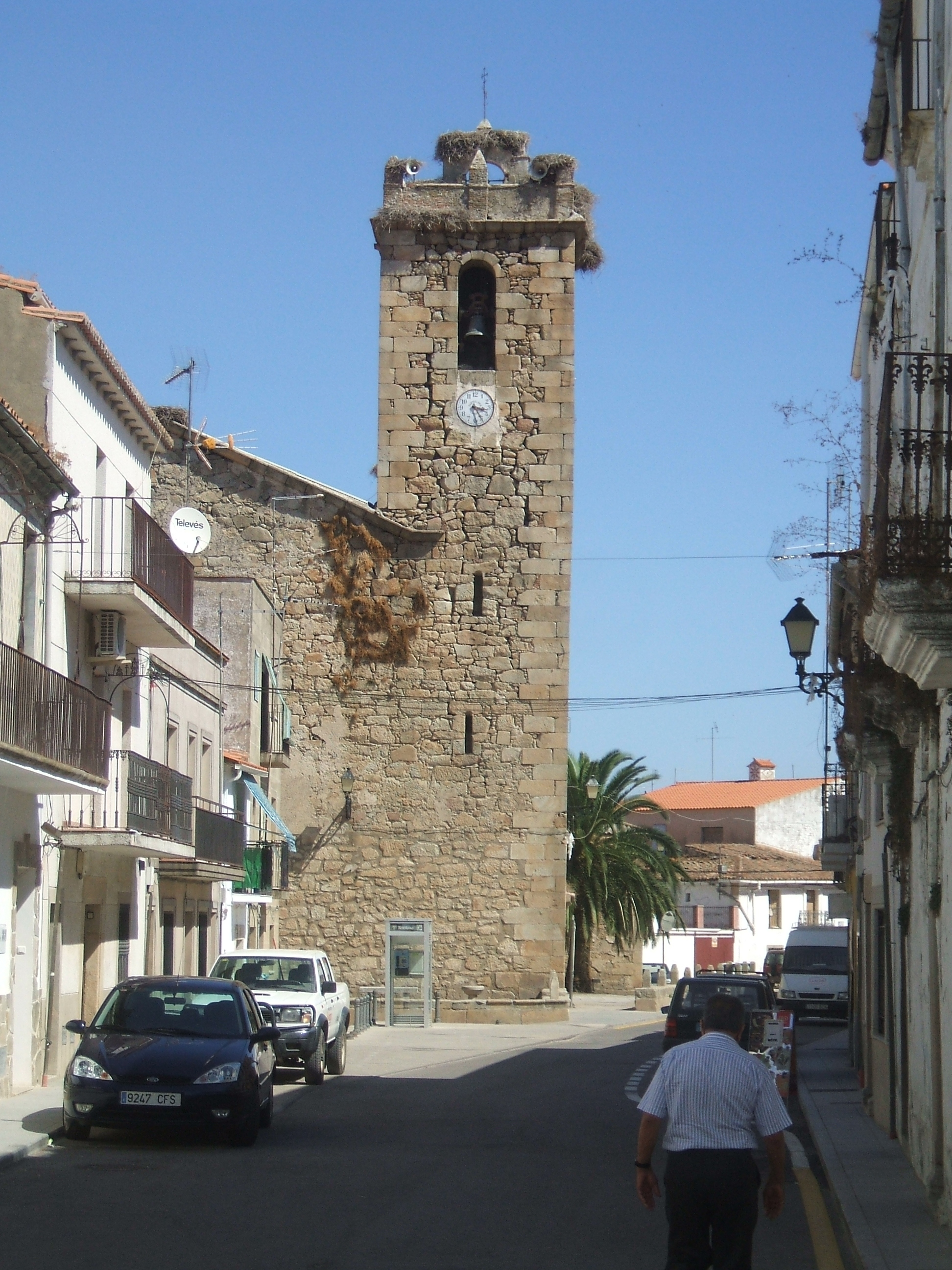 En Navas del Madroño la iglesia es de estilo herreriano y presenta esbelta y austera torre.